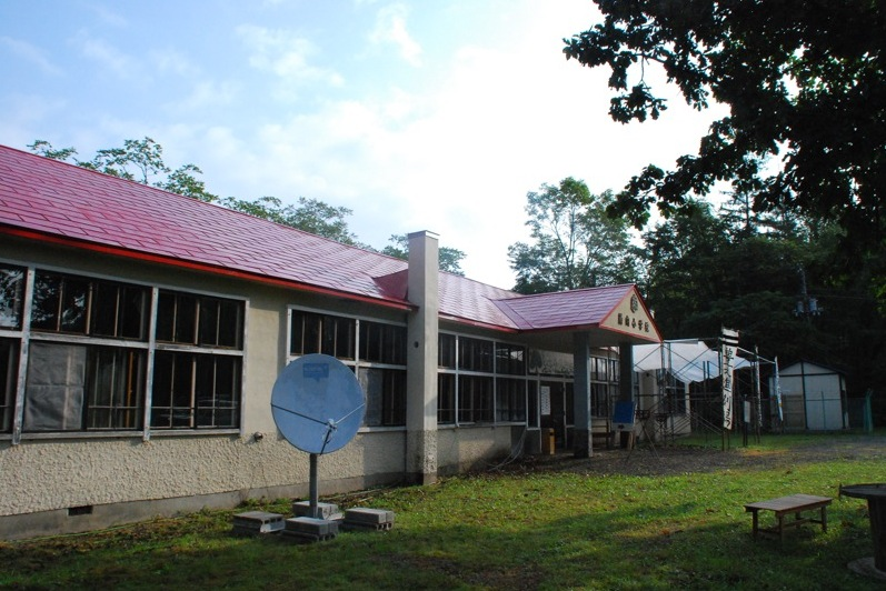 新得町新内ホール2010年、第15回Shintoku空想の森映画祭開催時撮影